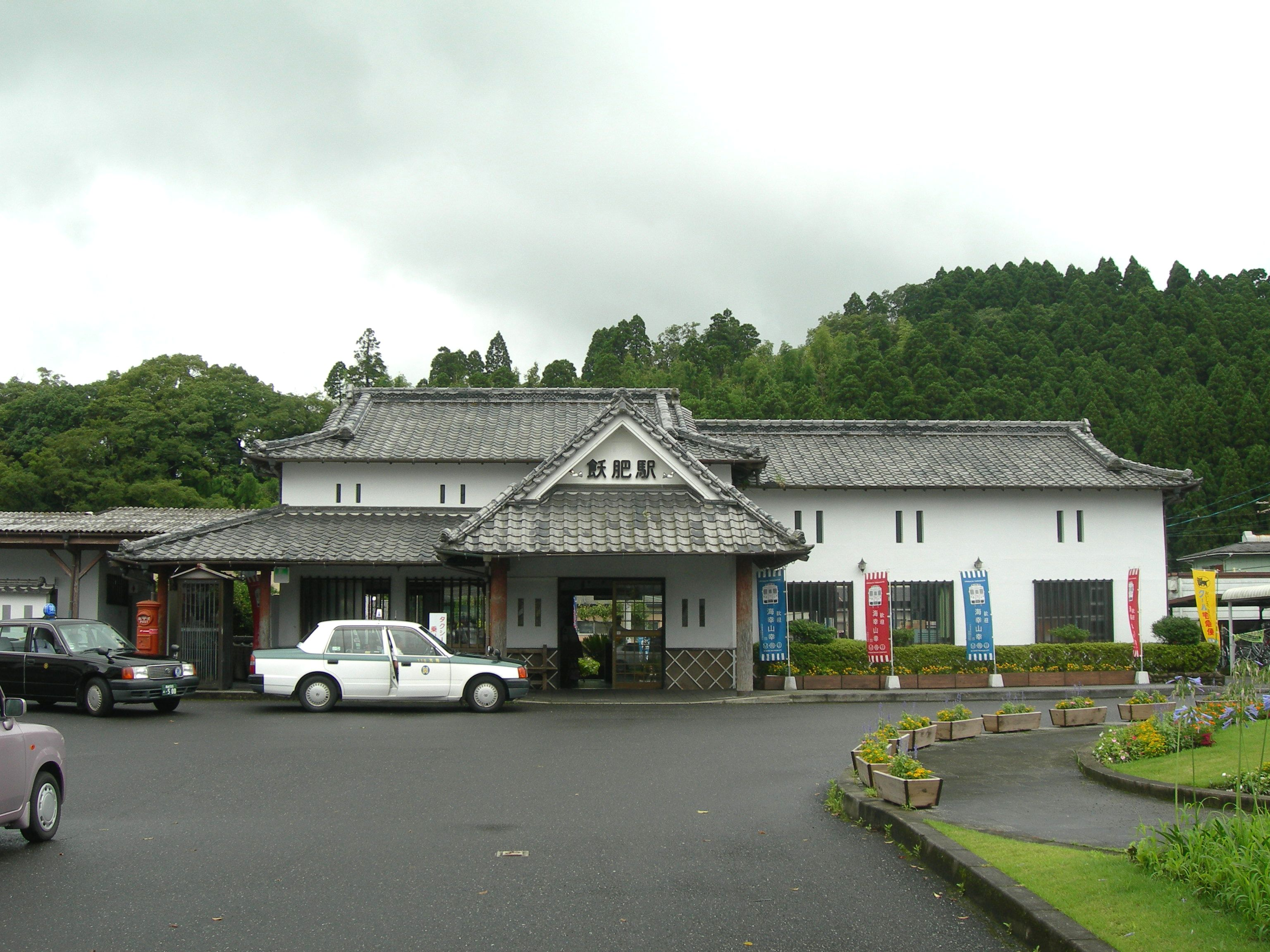 飫肥駅